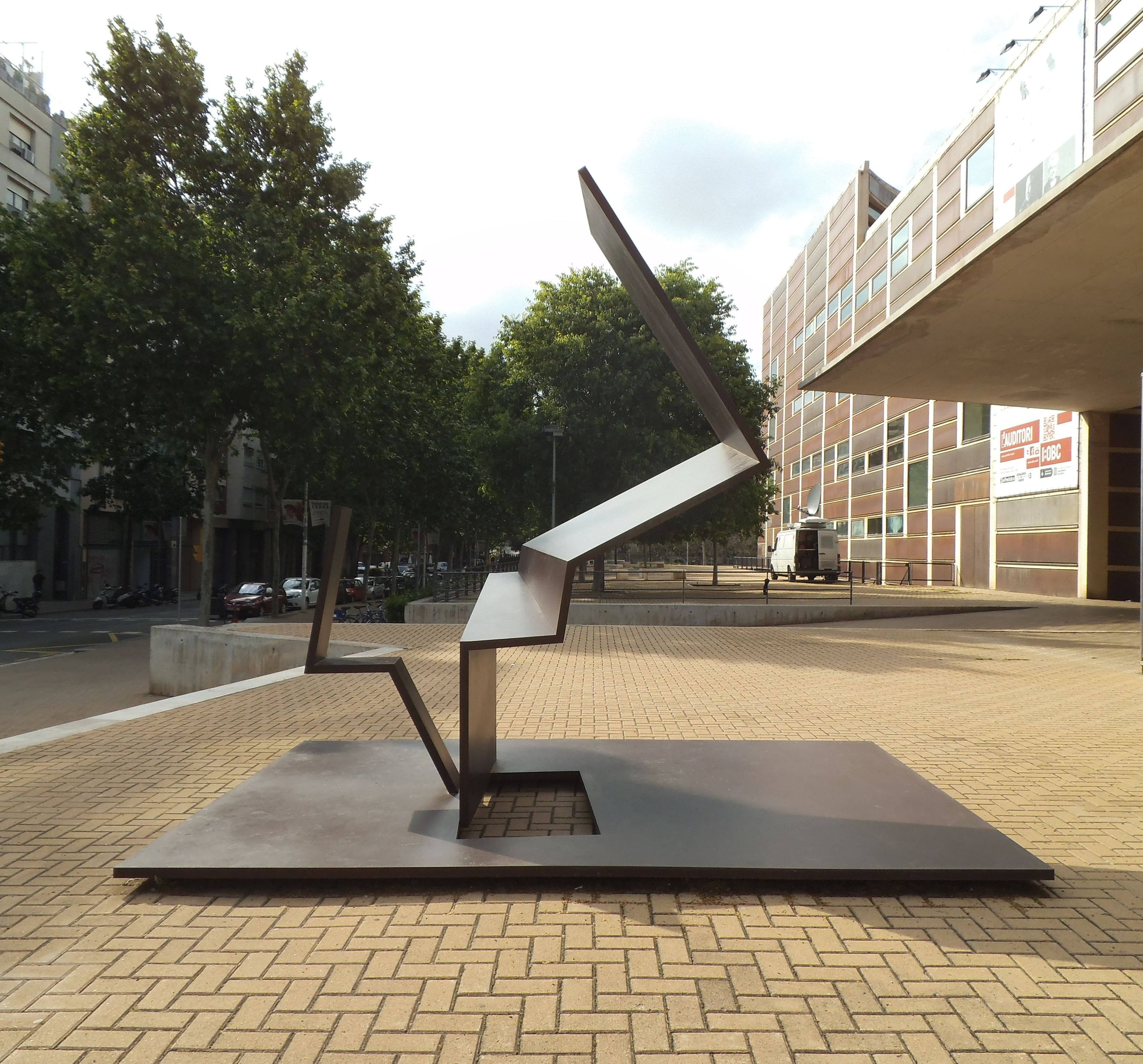 A Isaac Albéniz i Alícia de Larrocha (Alfons Alzamora). Lepant, 150 -Auditori- (Barcelona)